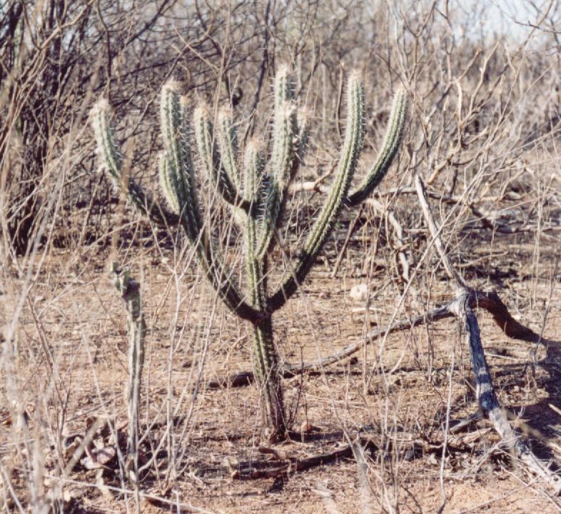 Brazil